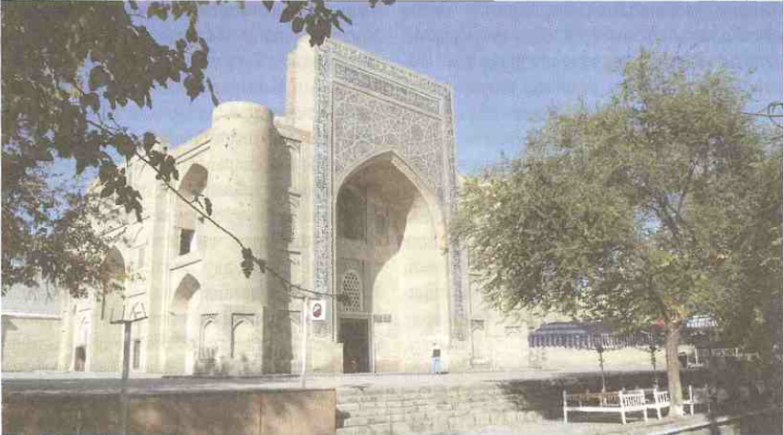 диуана ханакасы